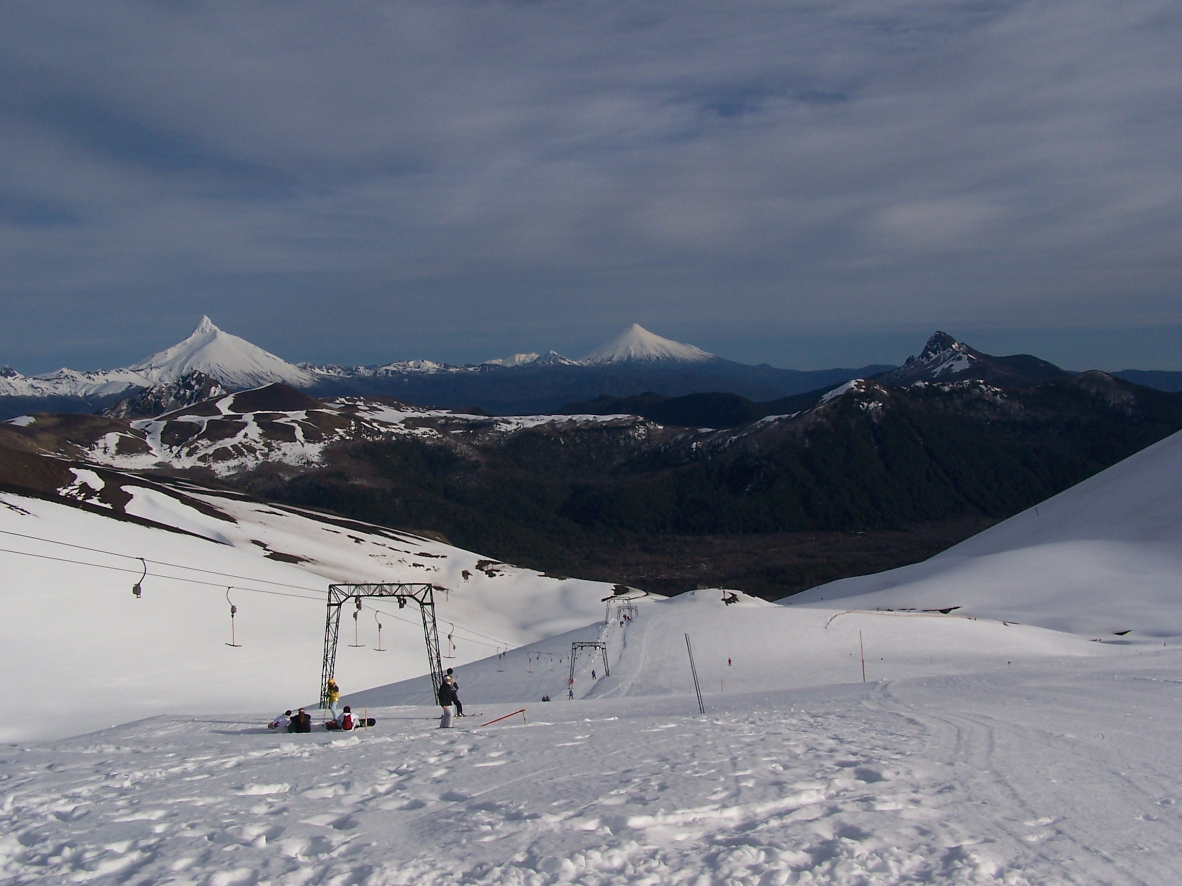 Fotografia desde la pista de ski Don Pedro en el Centro de Ski Antillanca, ubicado en la Decima Region de Los Lagos.